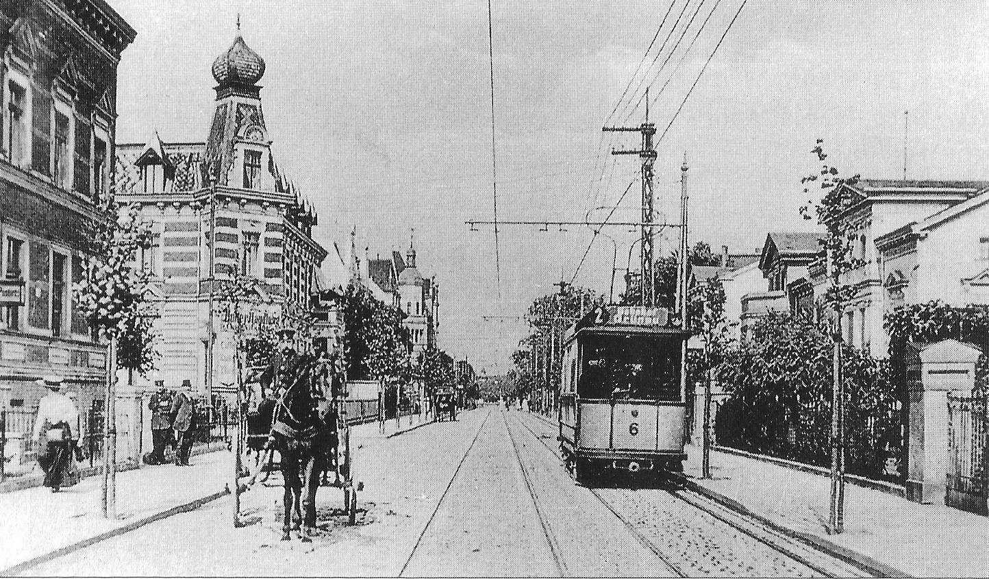 Triebwagen 6 der Städtischen Straßenbahn Cöpenick in der Wilhelmstraße, Grünau